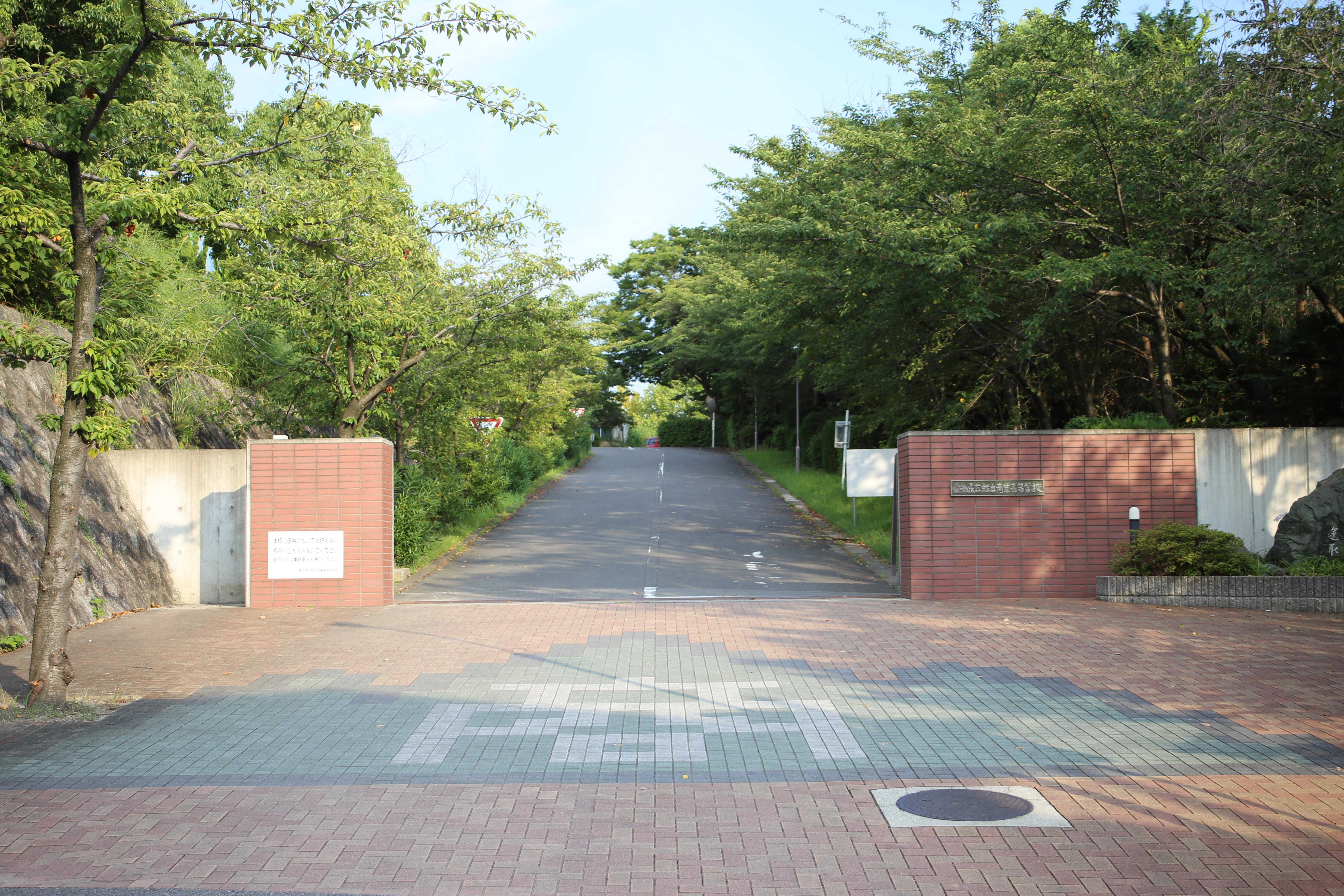 名古屋市守山区緑ヶ丘の愛知県立緑丘商業高等学校を北西公道より撮影